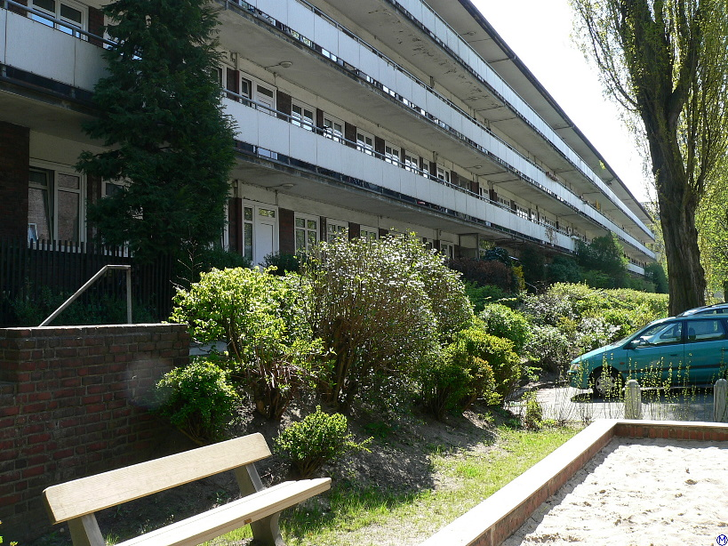 Laubenganghäuser in der Jarrestadt, in Hamburg (24.4.2005)